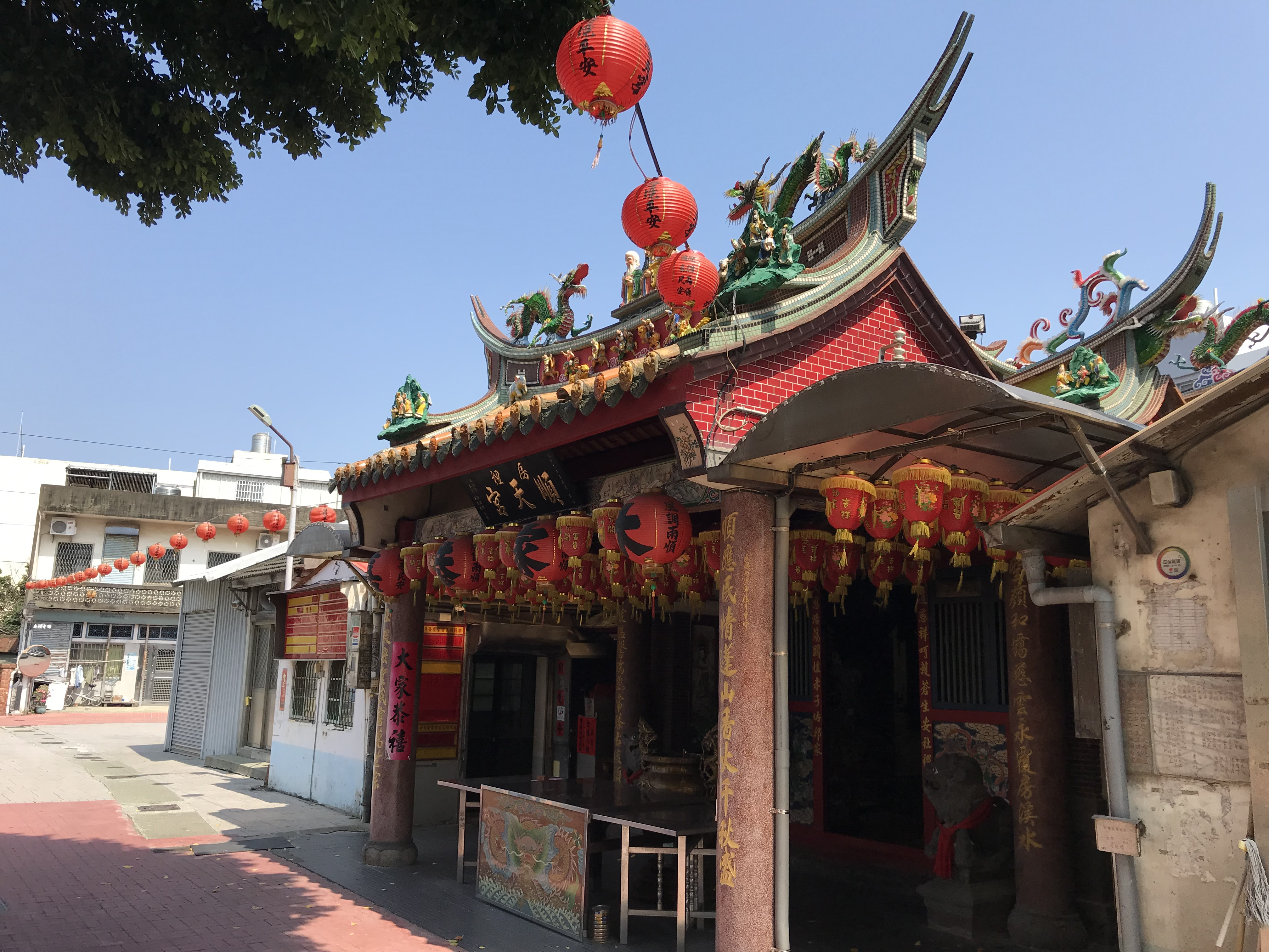 苑裡房里順天宮斜照